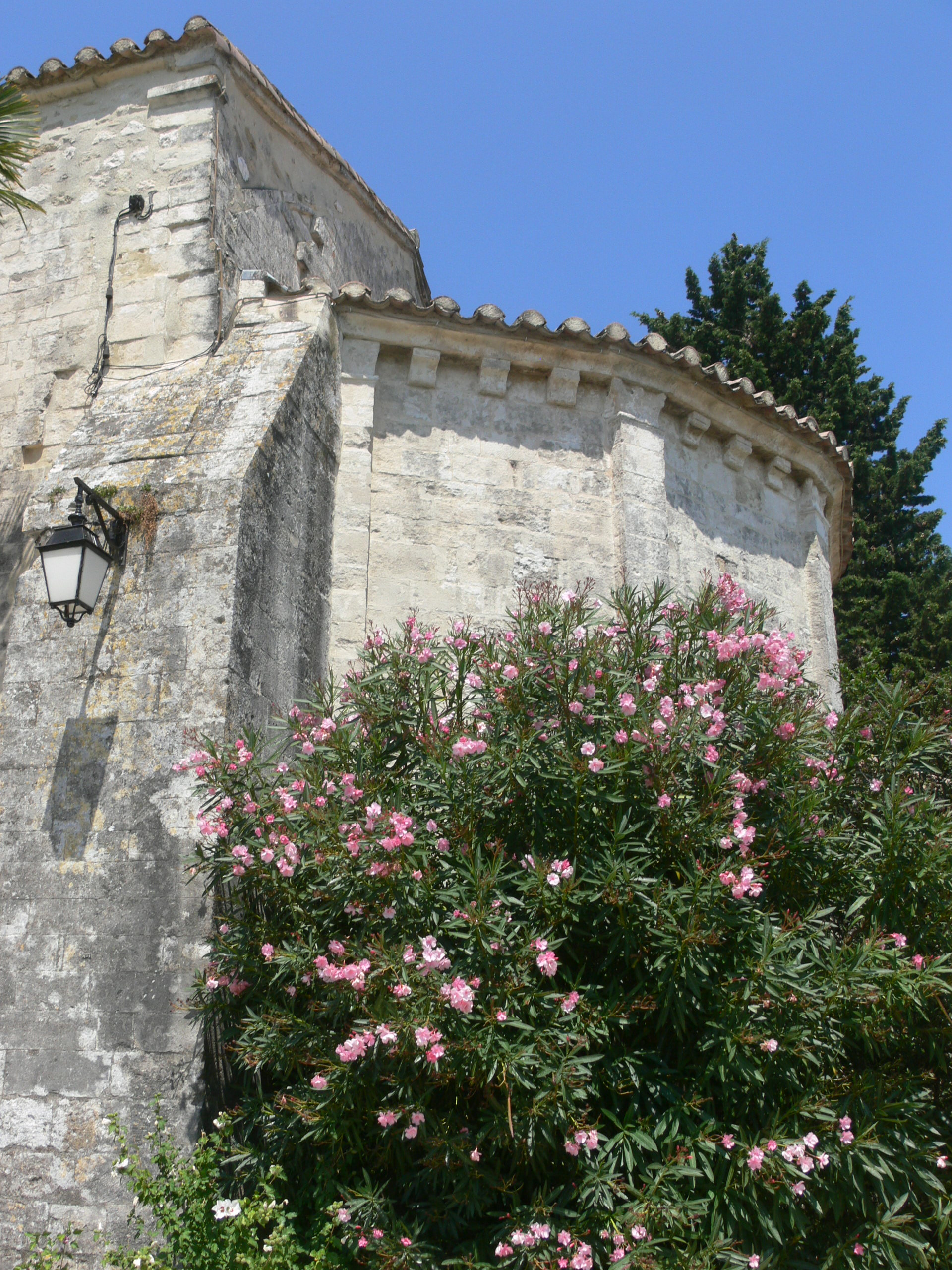 église Saint-Martin de Valaurie